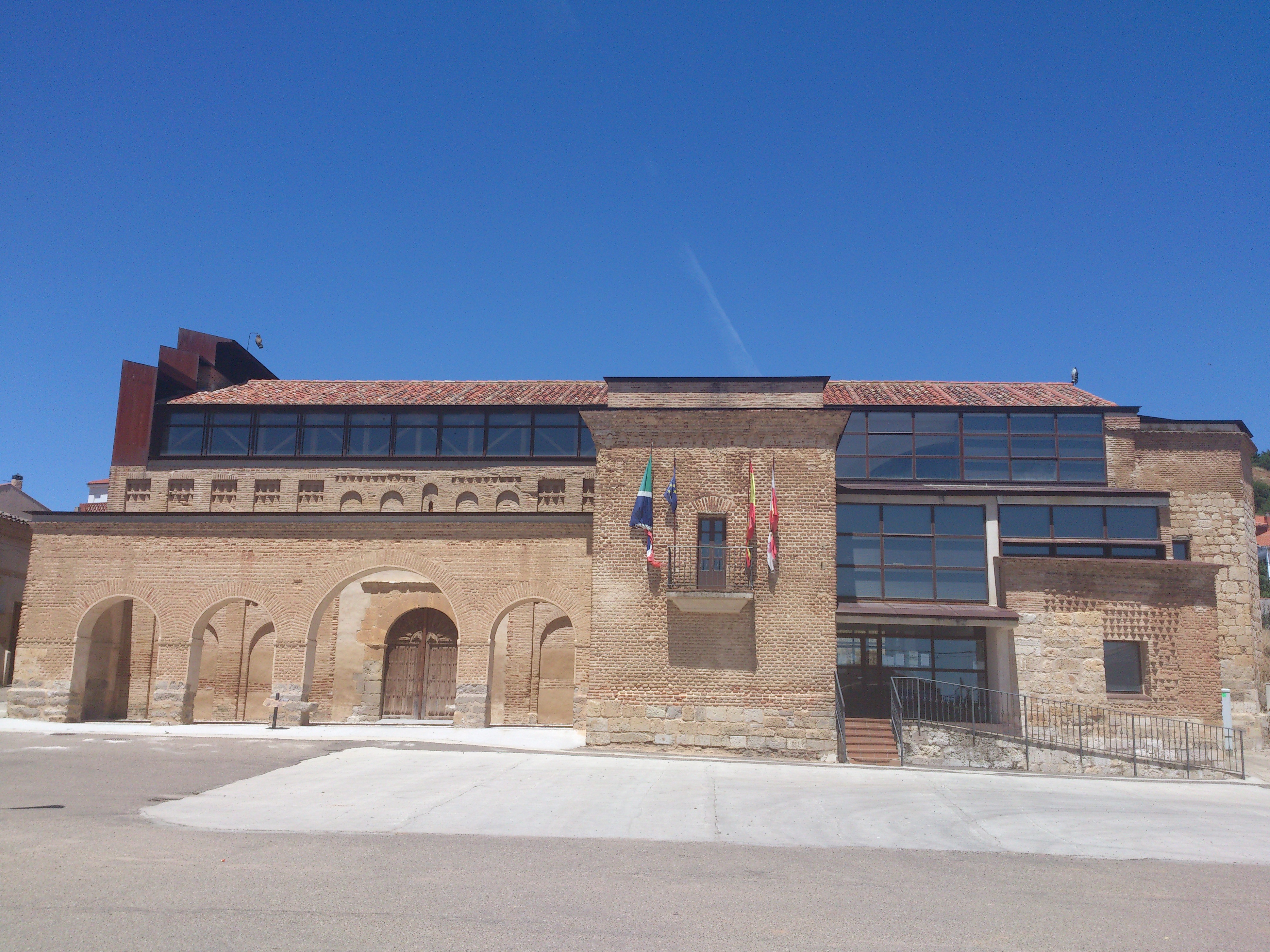 Belver de los Montes